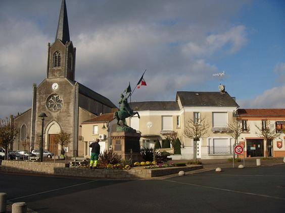 Place du chateau de Mondement